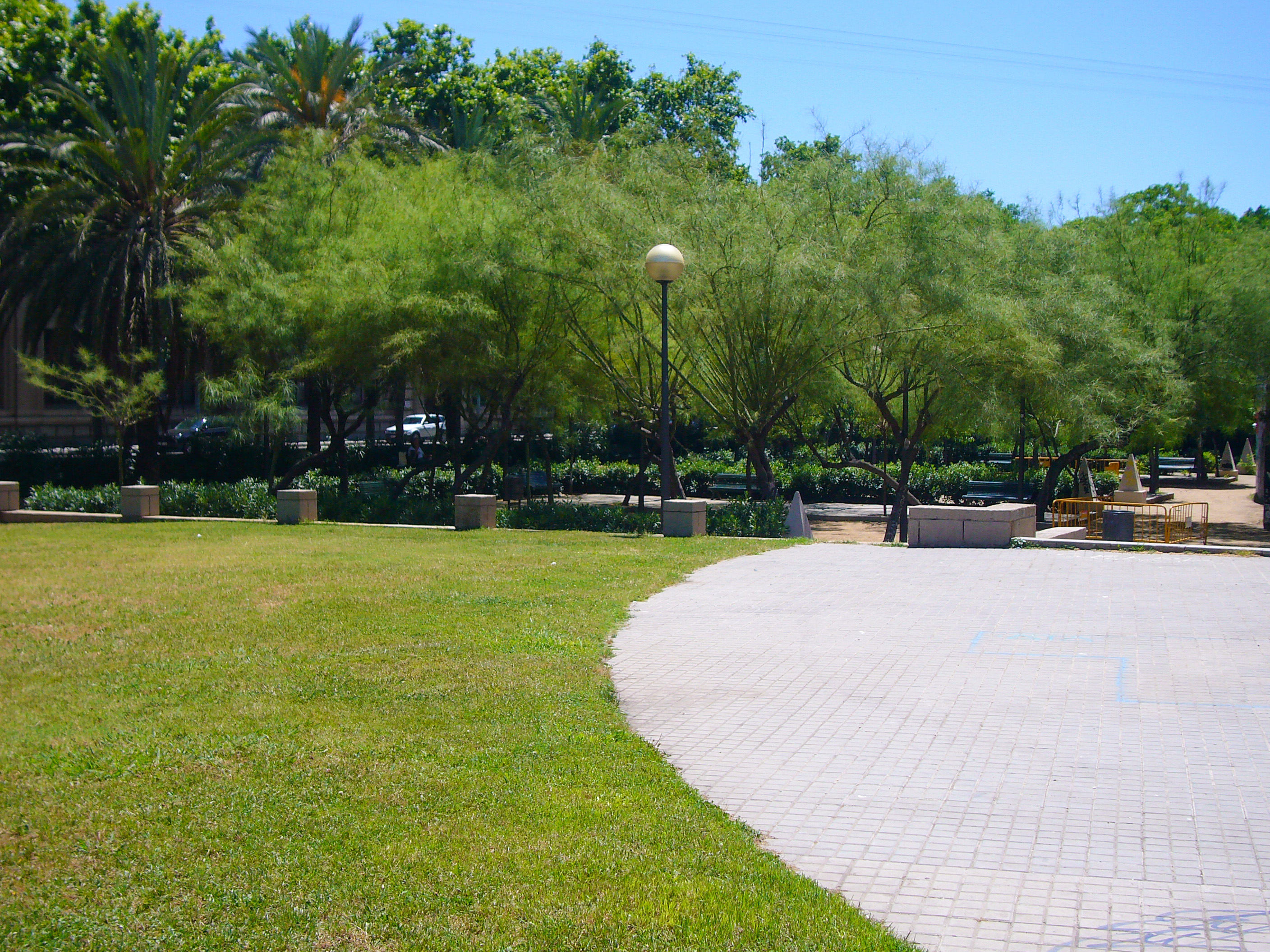 Accés des de plaça de les Drassanes